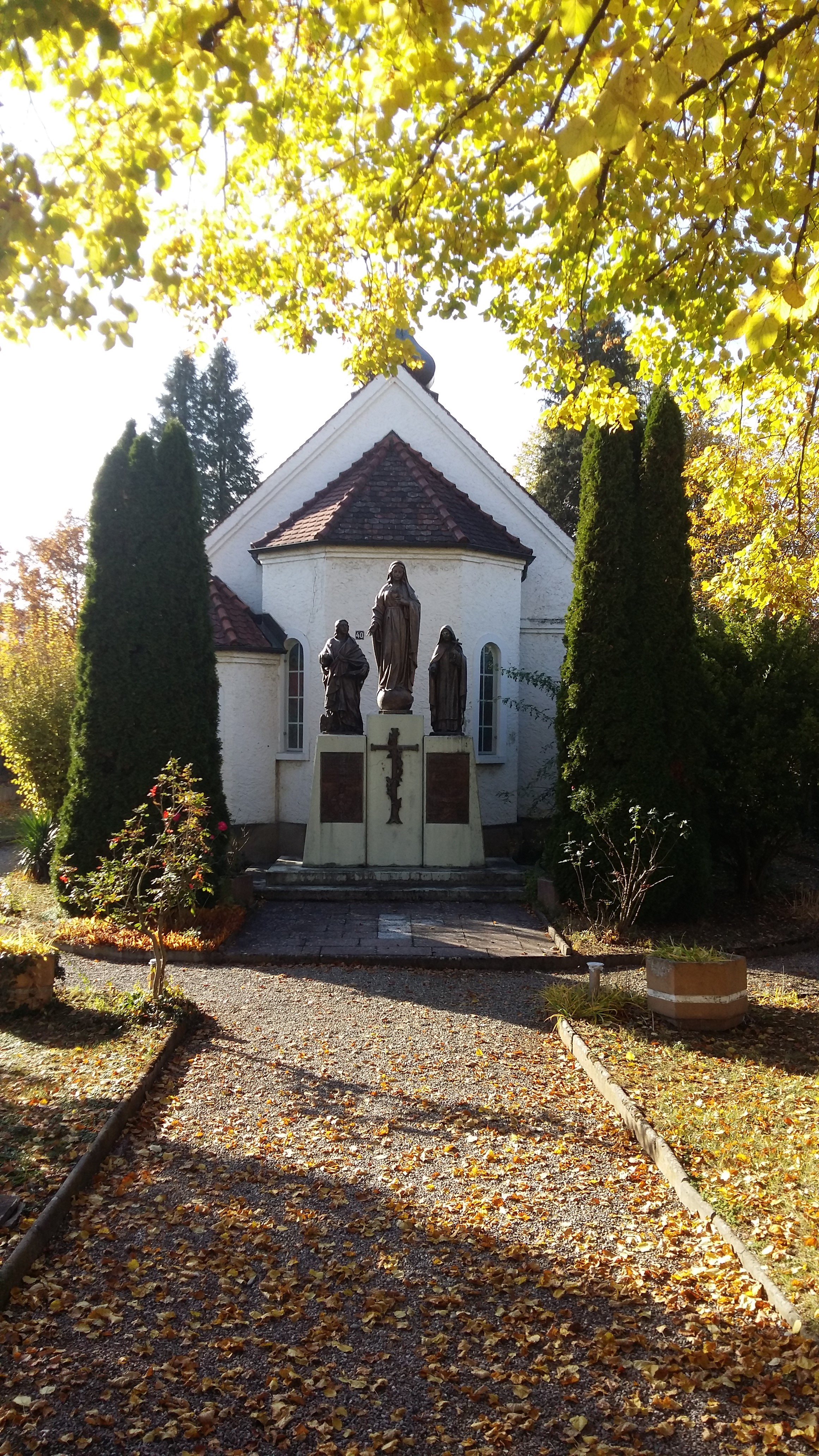 Theresienkapelle in Singen frontansicht